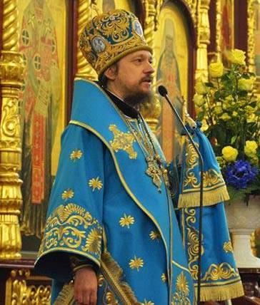 Епископ Геннадий (Гоголев)